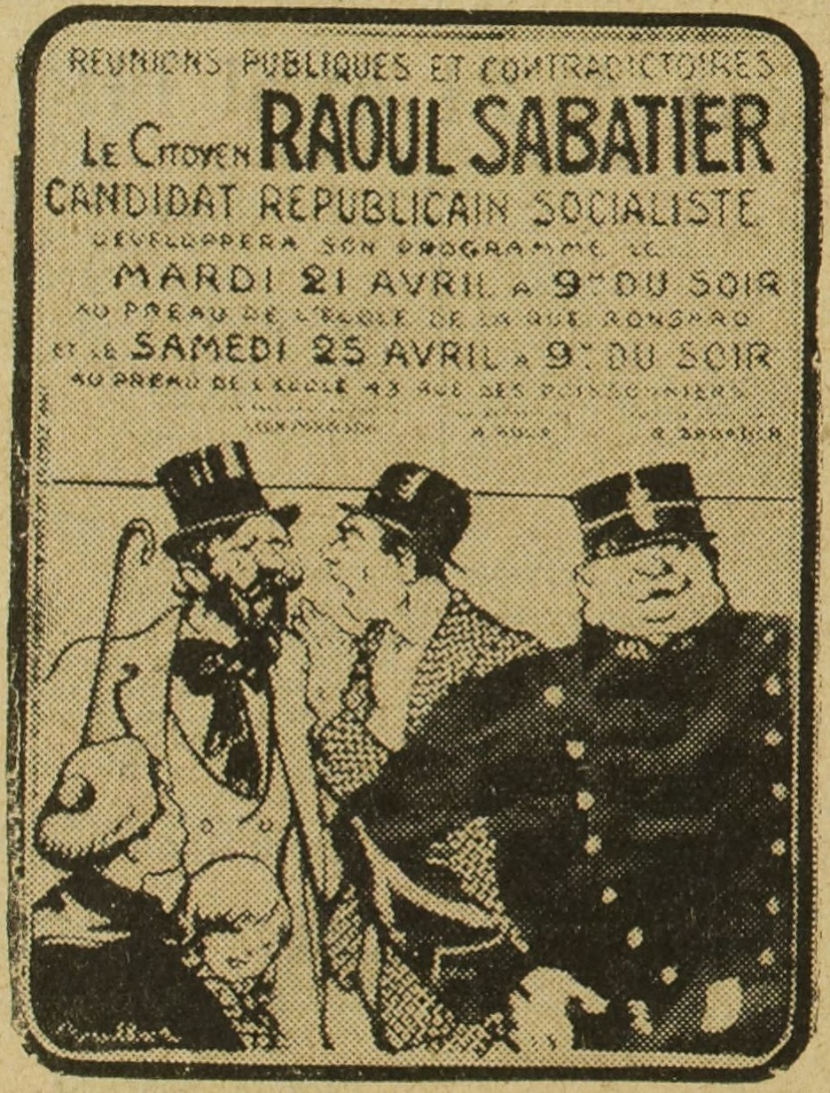 "L'affiche illustrée du candidat Sabatier, par Poulbot".